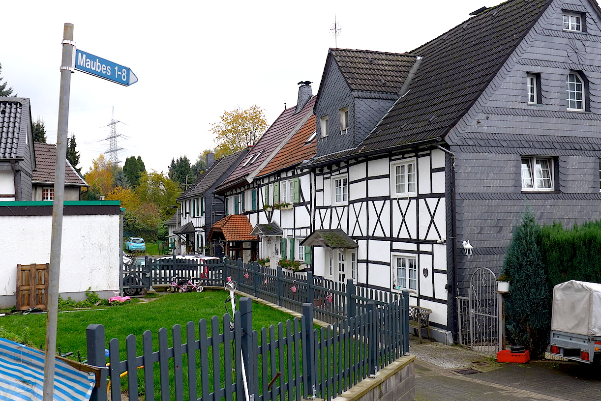 "Тропа Клинка" - туристский маркированнный маршрут вокруг немецкого города Золинген (Северный Рейн-Вестфалия). Восьмой этап: между Вуппером и Иттером. 7.2 км.